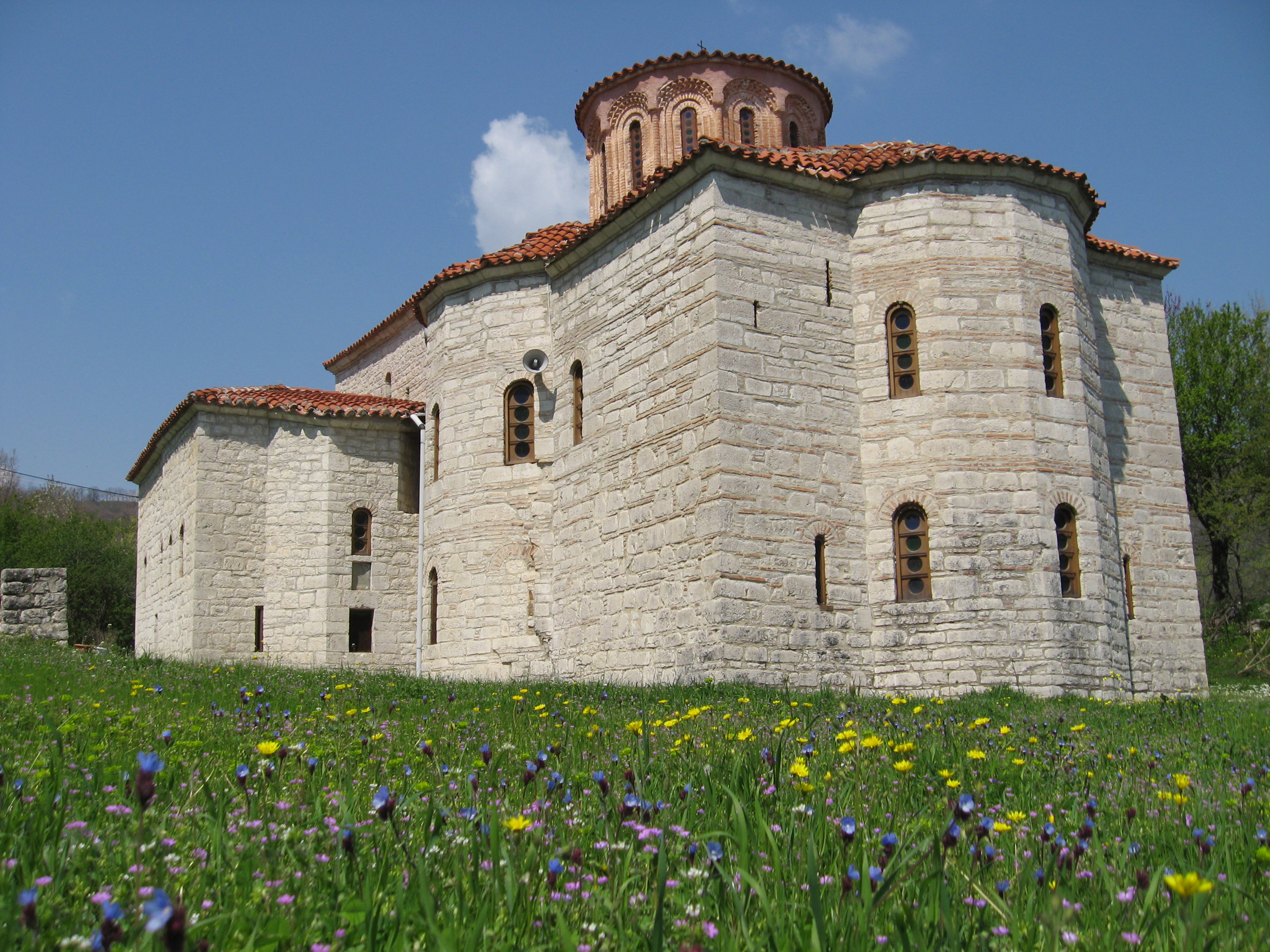 Монастырь Петрас весной.